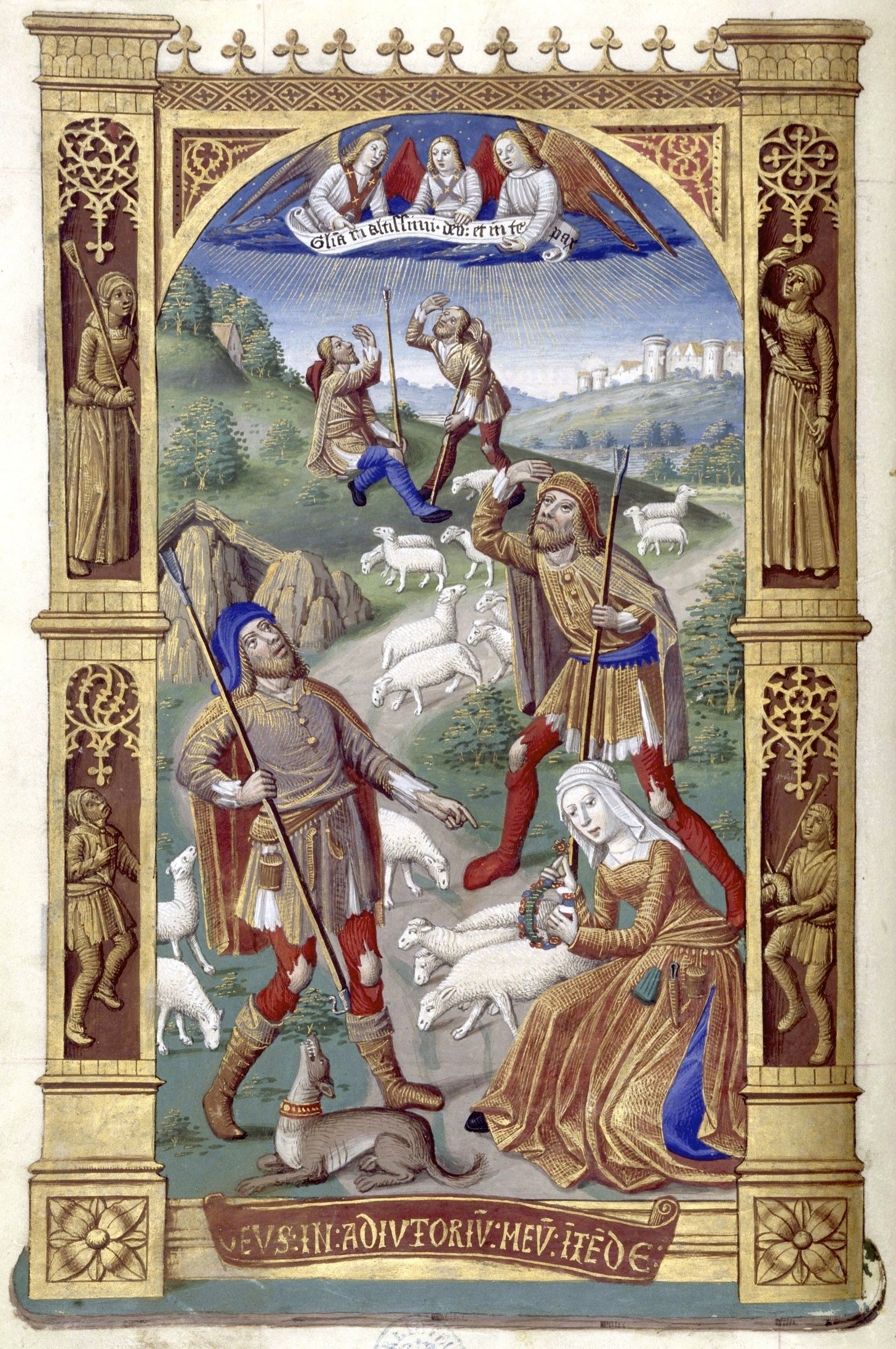 Heures de Charles VIII 039V Annonce aux bergers